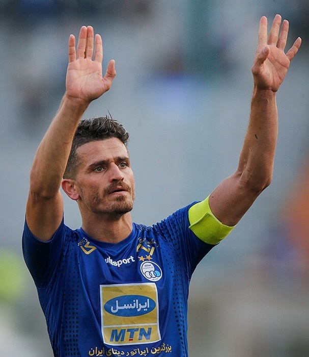 نگاره‌ای از دیدار دو تیم استقلال و صنعت نفت آبادان در ۱۴ آبان ۱۳۹۸ در ورزشگاه آزادی که تیم استقلال با نتیحه ۵-۰ پیروز دیدار شد. (مشاهده گزارش بازی)